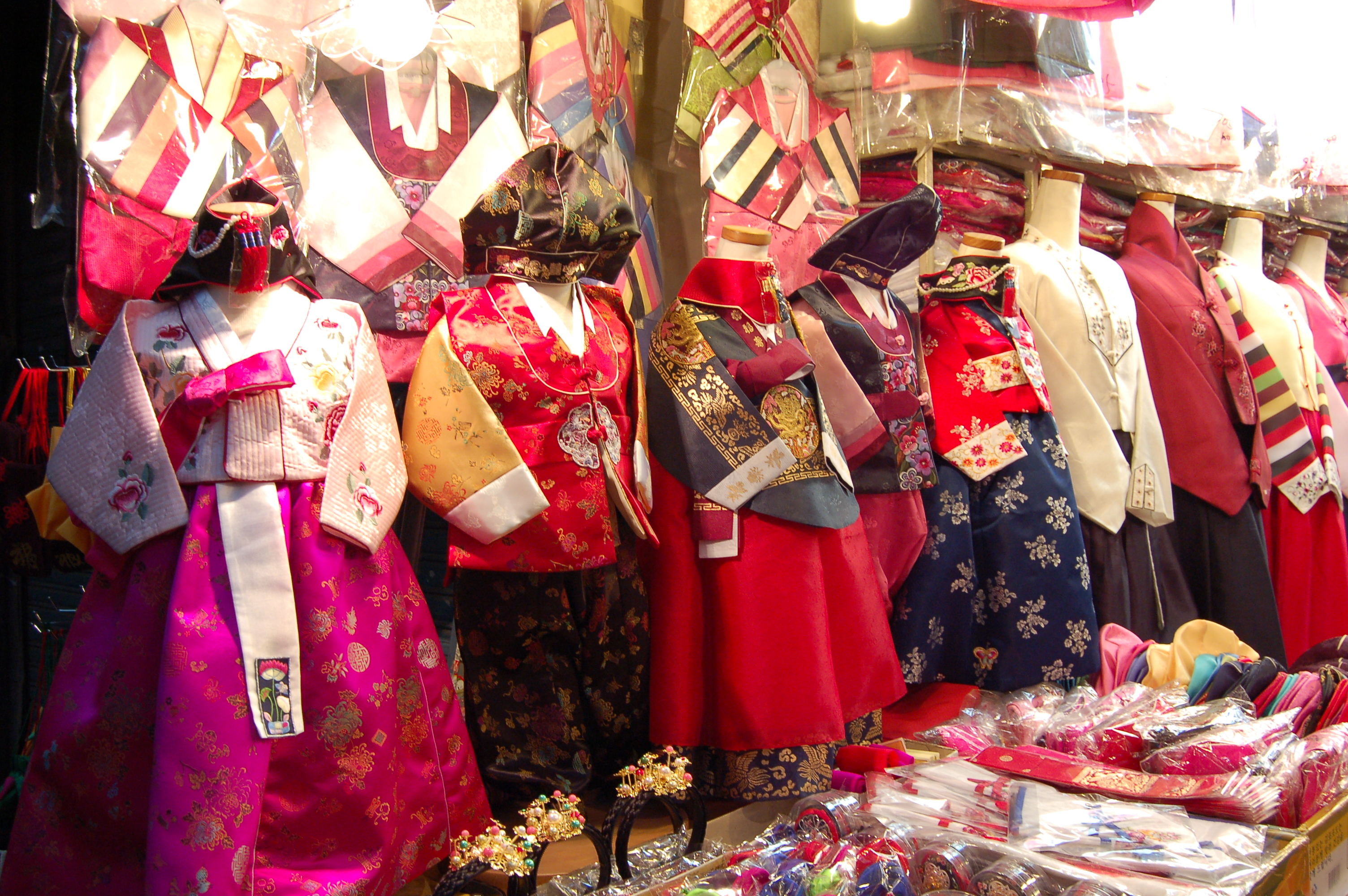 Hanbok store in Dondaemun market, Seoul, Korea